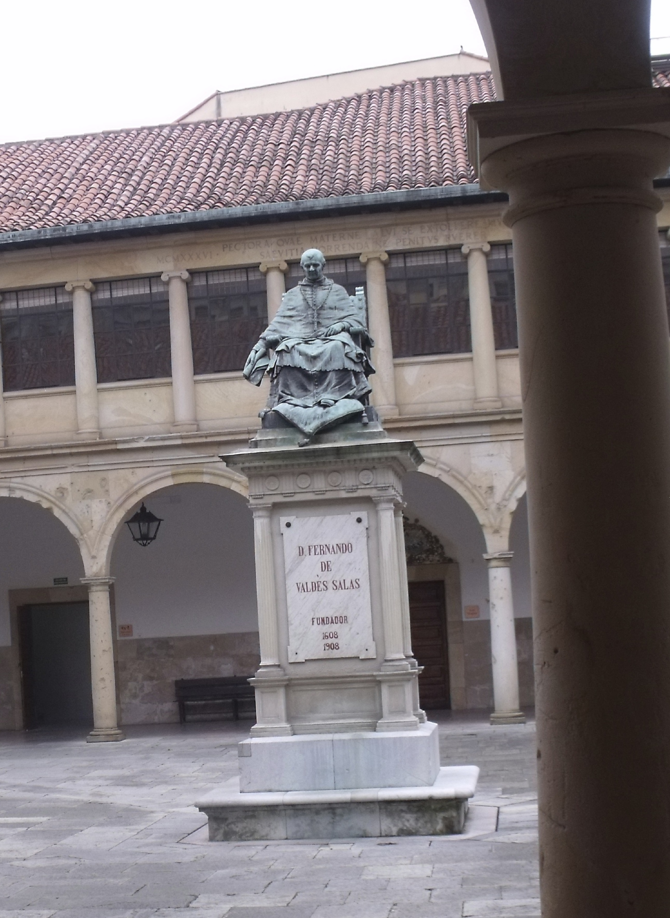 Escultura de Cipriano Folgueras Doiztúa